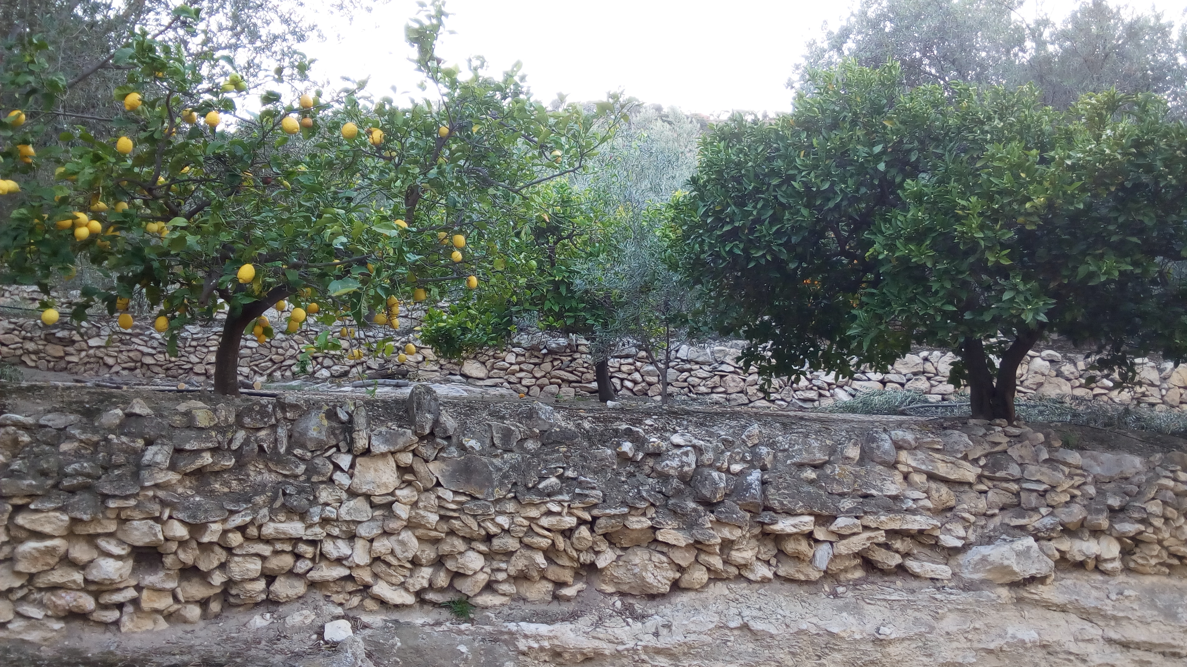 Bancales mixtos de olivar y cítricos en los alrededores de Pinos del Valle.